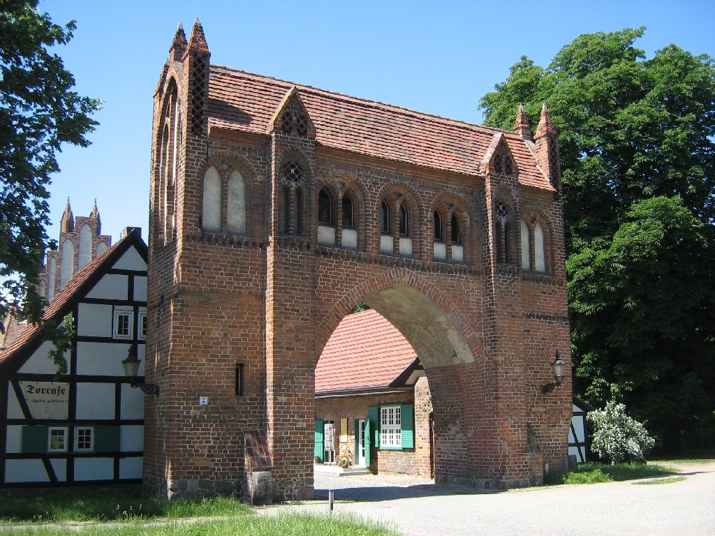 Das Friedländer Tor (Vortor, Feldseite) in Neubrandenburg in Mecklenburg.